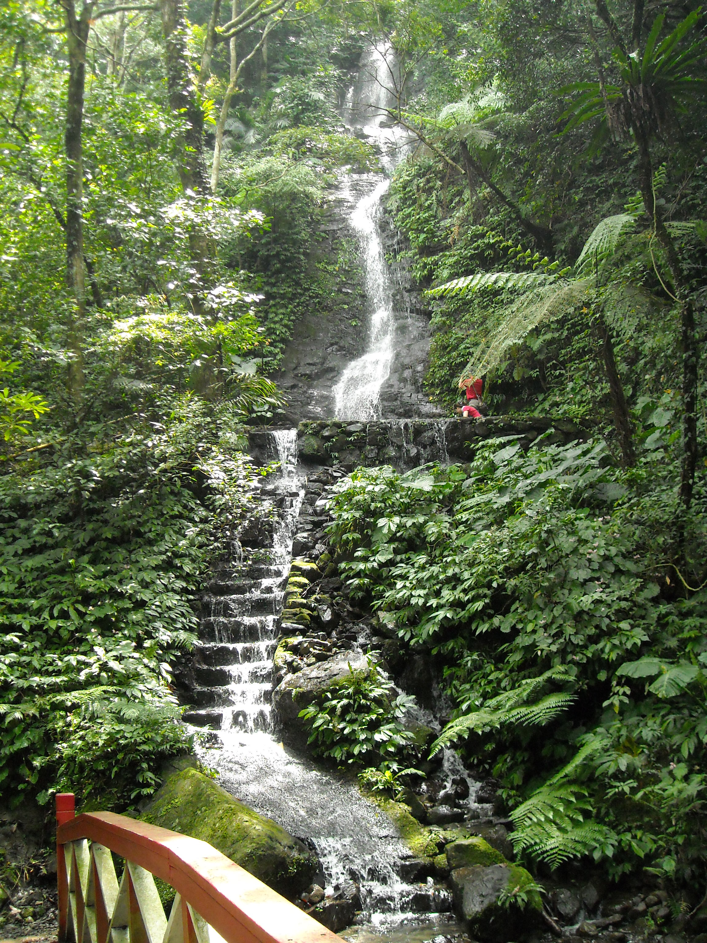 新竹縣關西鎮馬武督瀑布。